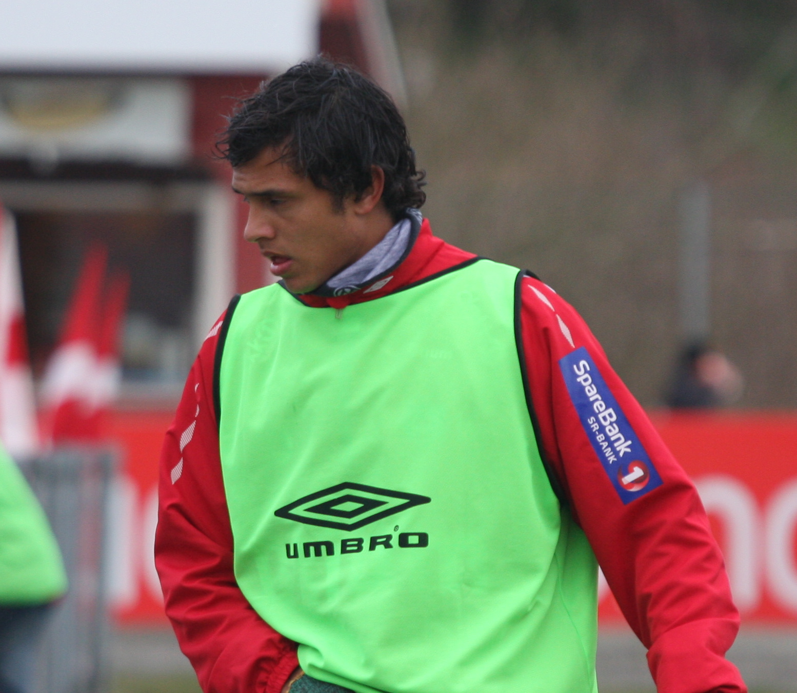 Jakop Storhaug at Bryne stadion